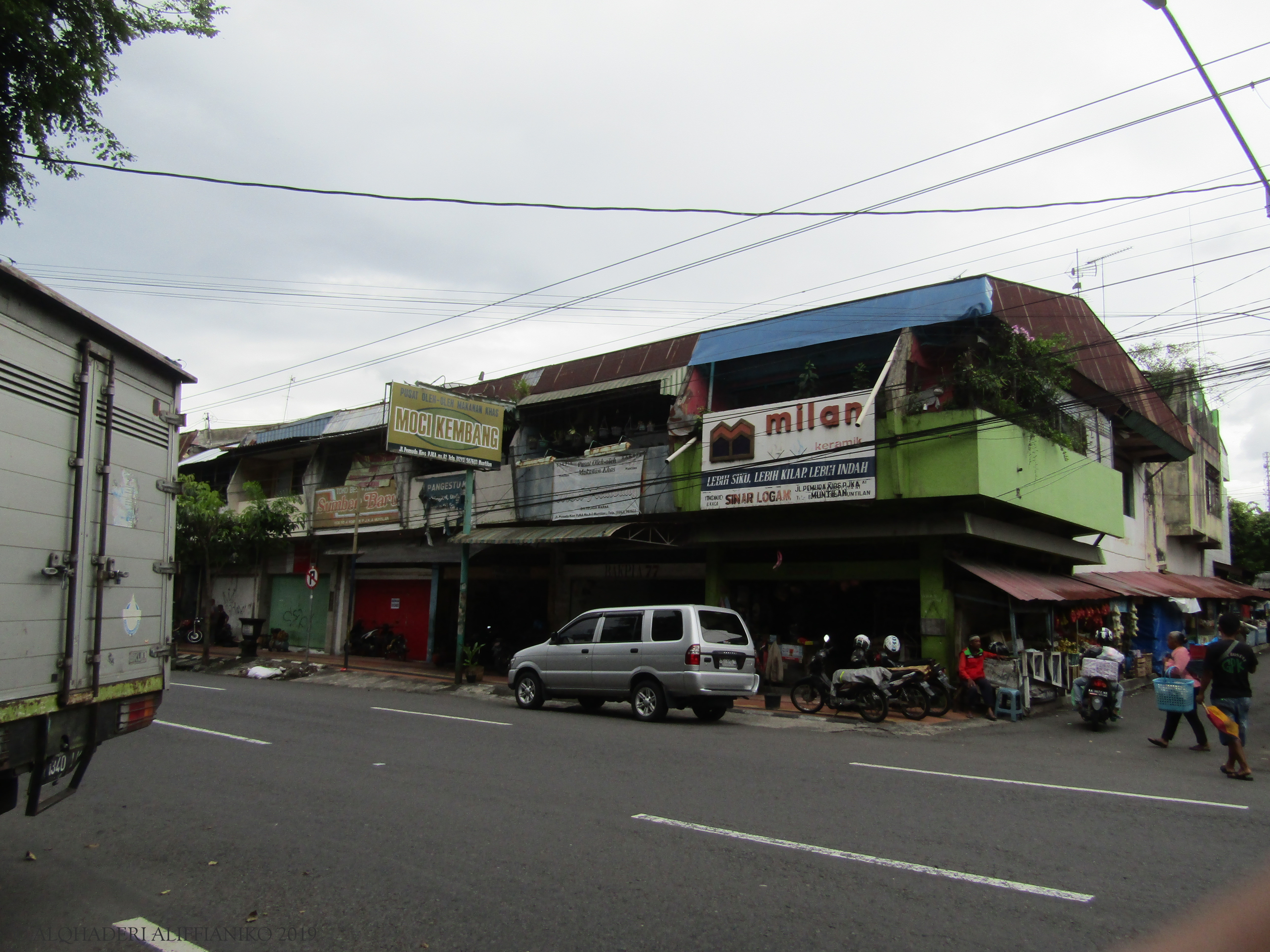 Kios PJKA Muntilan yang menempati sisi barat bekas emplasemen Stasiun Muntilan